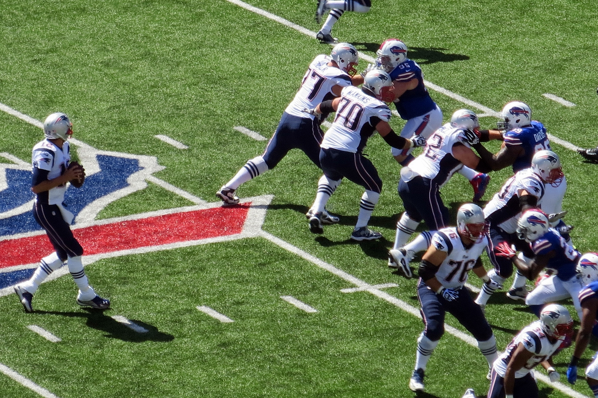 Tom Brady dans la poche contre les Bills de Buffalo le 8 septembre 2013.